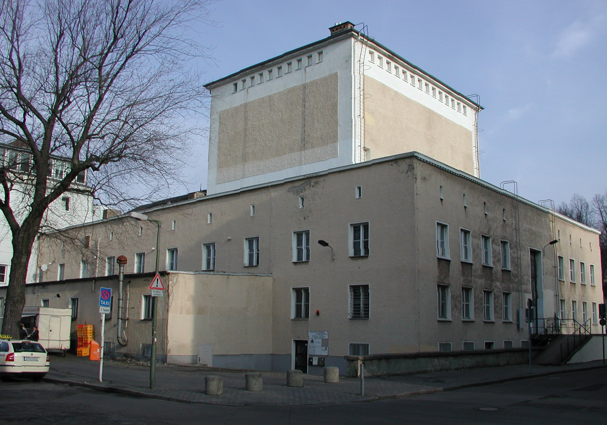 Haus der Offiziere in der Stolzenfelsstraße (1)